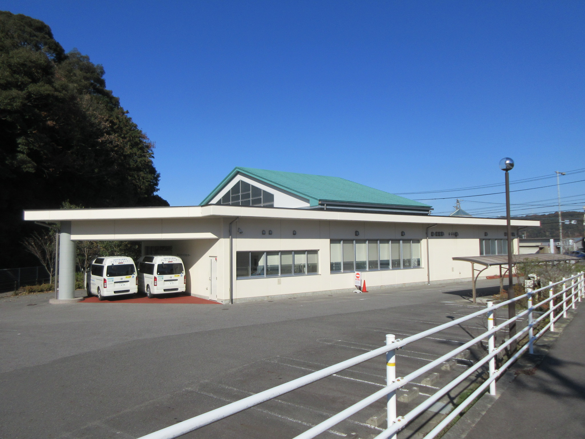 岡崎市東部地域福祉センター（岡崎市山綱町）